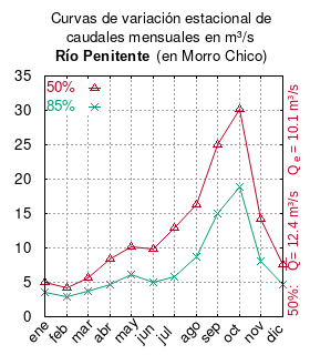 Curvas de variación estacional del río Penitente en Morro Chico. # # Estudio básico para desarrollar plan de riego en Región de Magallanes. Informe final. # Comisión Nacional de Riego # Ministerio de Agricultura # 2017 # url: # urlarchivo: # Tabla 4-7 Resultados de análisis de frecuencia de caudales medios mensuales (m3/s) seleccionados en la Región de Magallanes y Antártica Chilena, pág. 115 mes 50% 85% ene 5.01 3.48 feb 4.23 2.86 mar 5.6 3.67 abr 8.32 4.7 may 10.23 6.07 jun 9.9 5 jul 12.87 5.77 ago 16.34 8.66 sep 24.93 14.95 oct 30.12 18.83 nov 14.17 8.14 dic 7.56 4.65 This plot was created with Gnuplot.